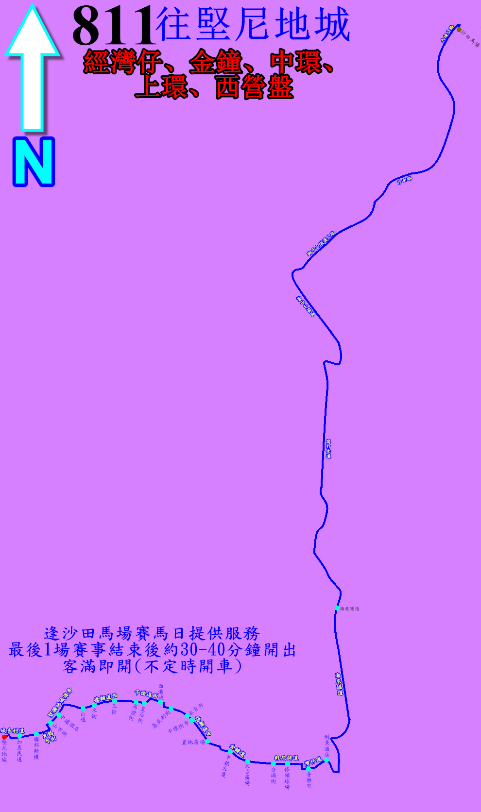 中文（香港）: 馬場巴士811線的走線圖